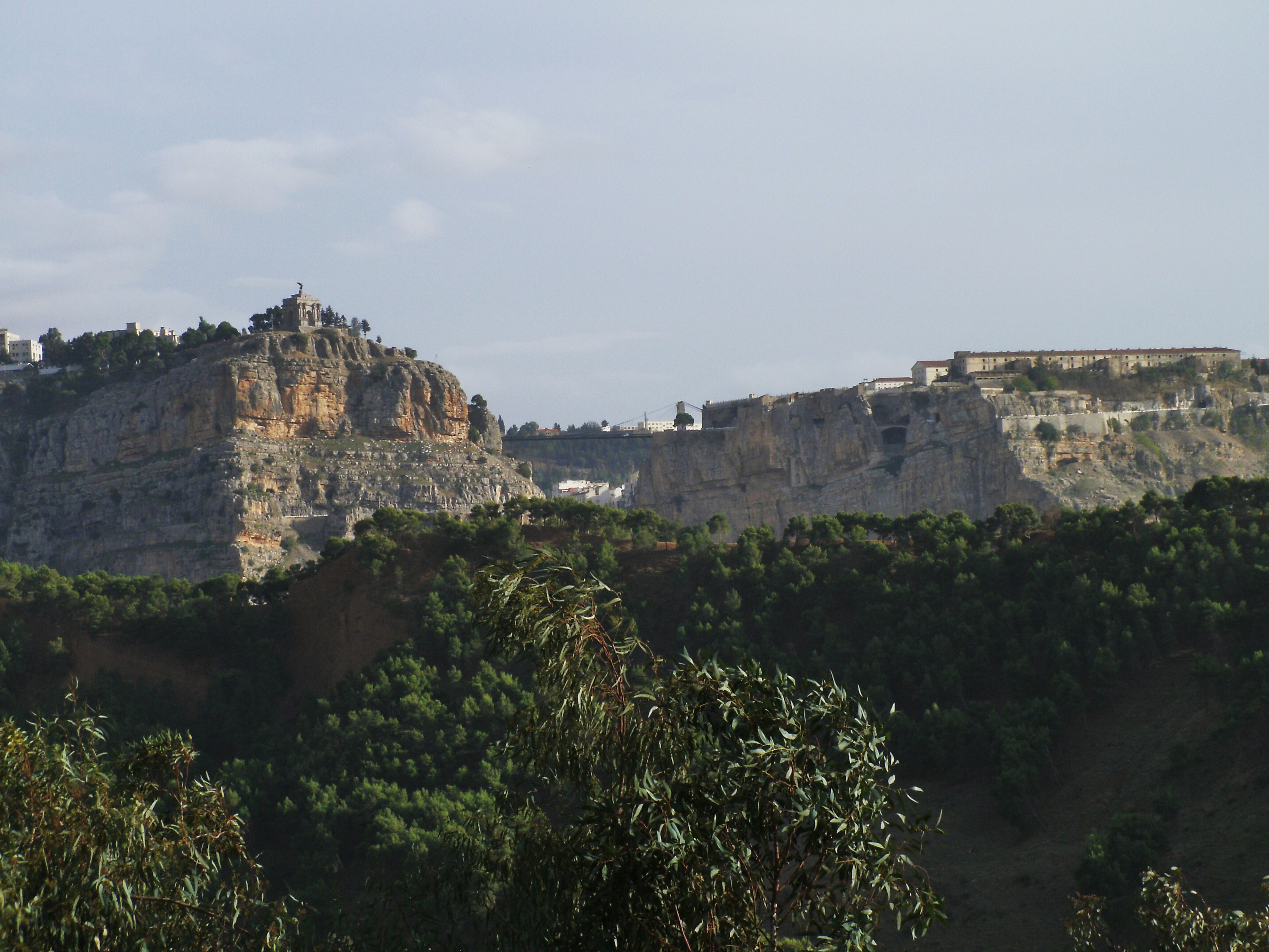 Le Monument aux morts de Constantine. Situation